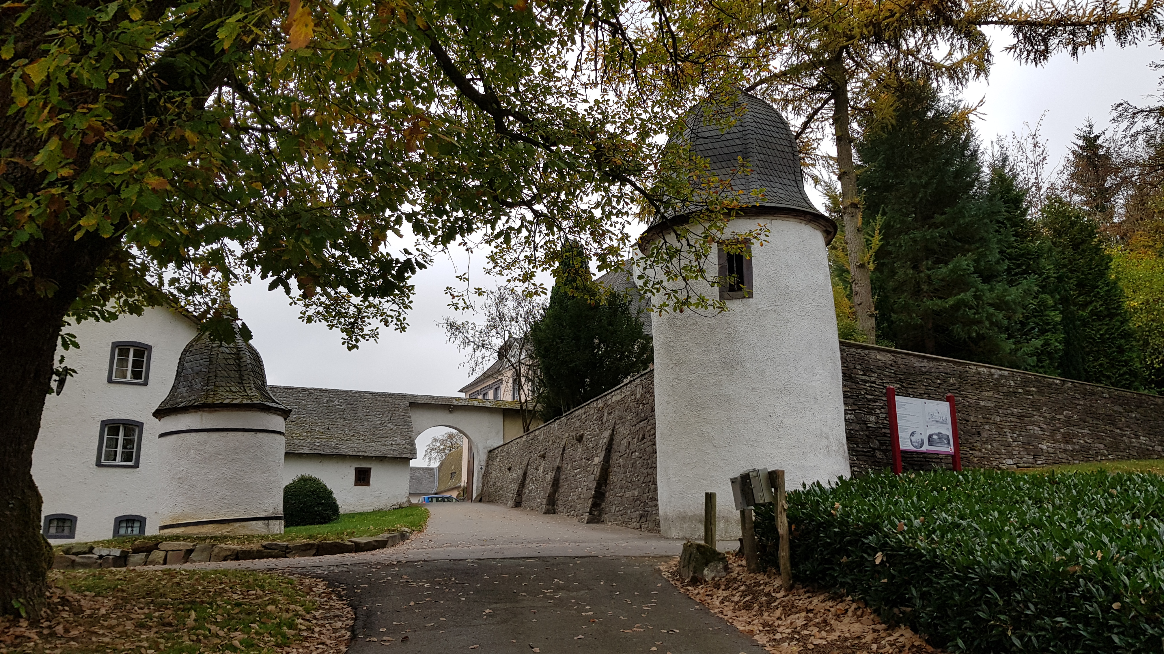 Schloss Wallerode, Wallerode, Sankt Vith, Belgien This photo of immovable heritage has been taken in the Walloon Region